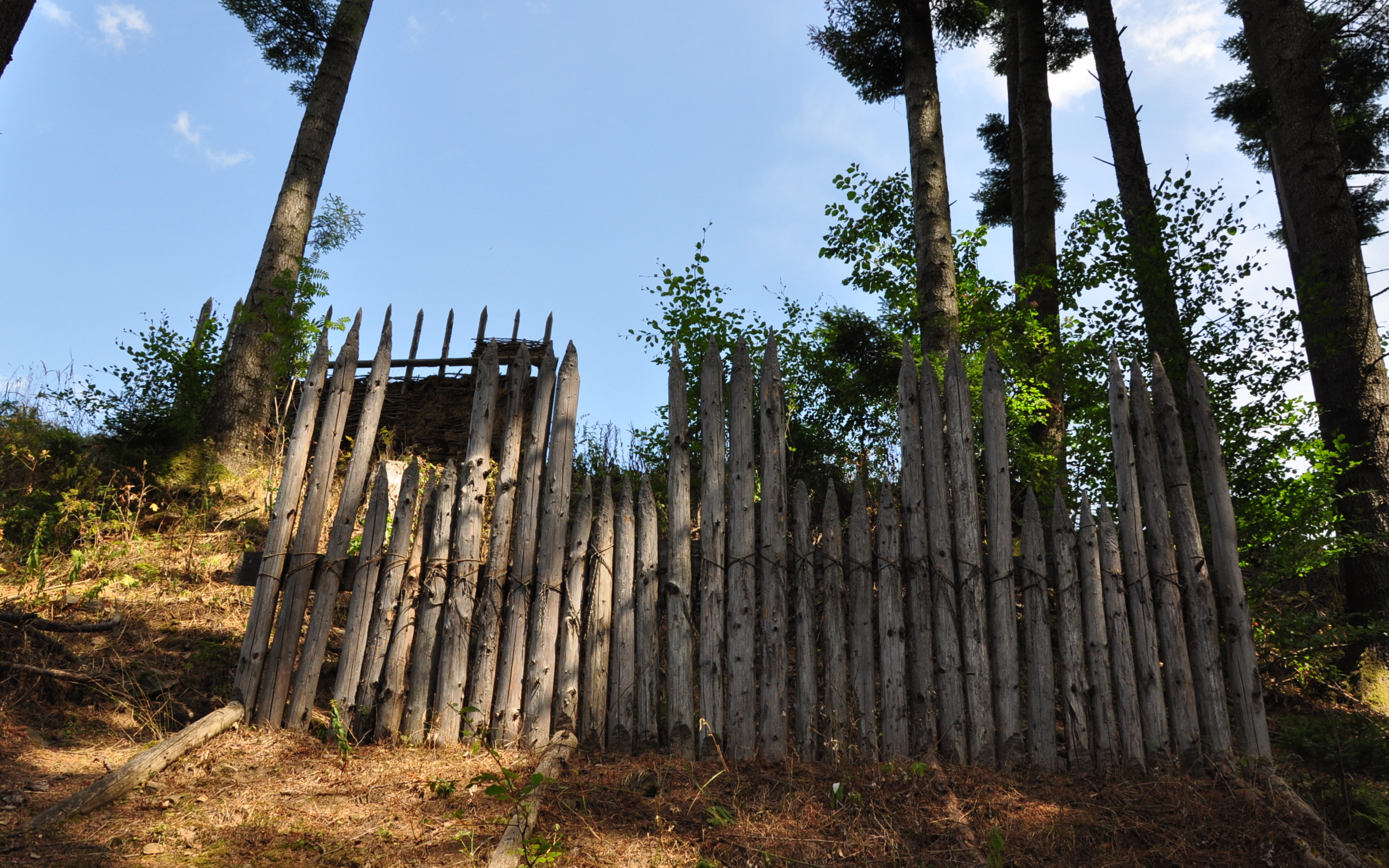 Situl arheologic de la Covasna, "Cetatea Zânelor"